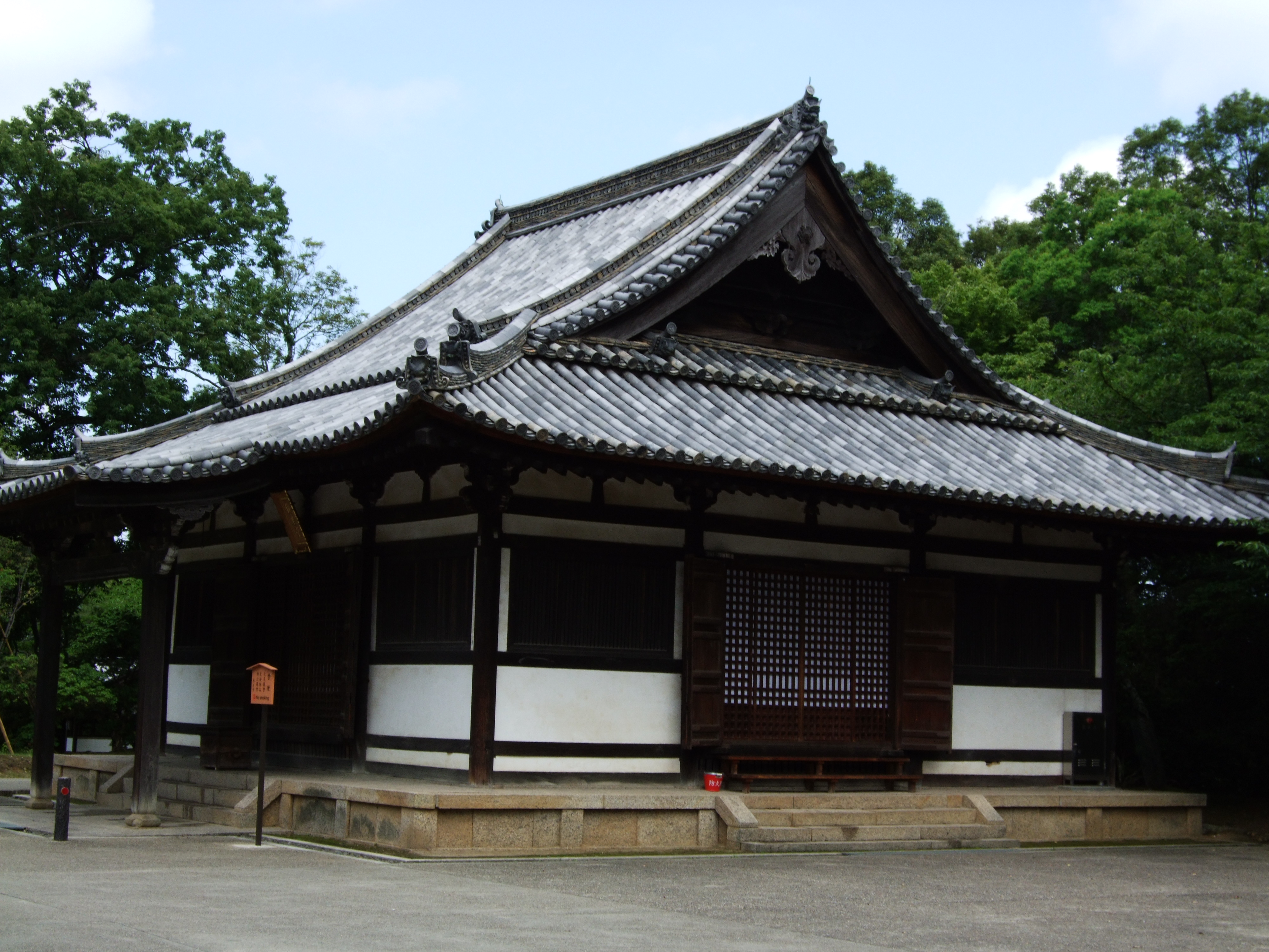 東大寺（奈良市） 俊乗堂（国宝）